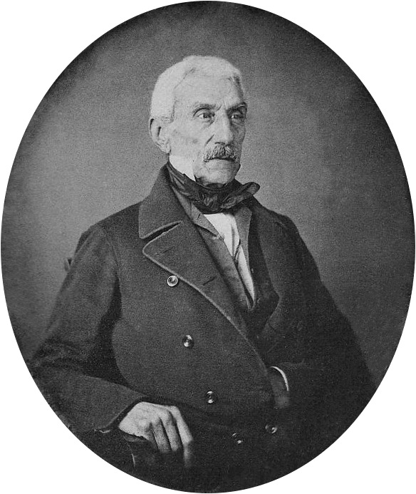 Daguerrotipo de San Martín tomado en París en 1848. Placa de cobre de 12 por 10 cm. Se trata de la única imagen fotográfica de José de San Martín, el original se encuentra en el Museo Histórico Nacional (Argentina) .